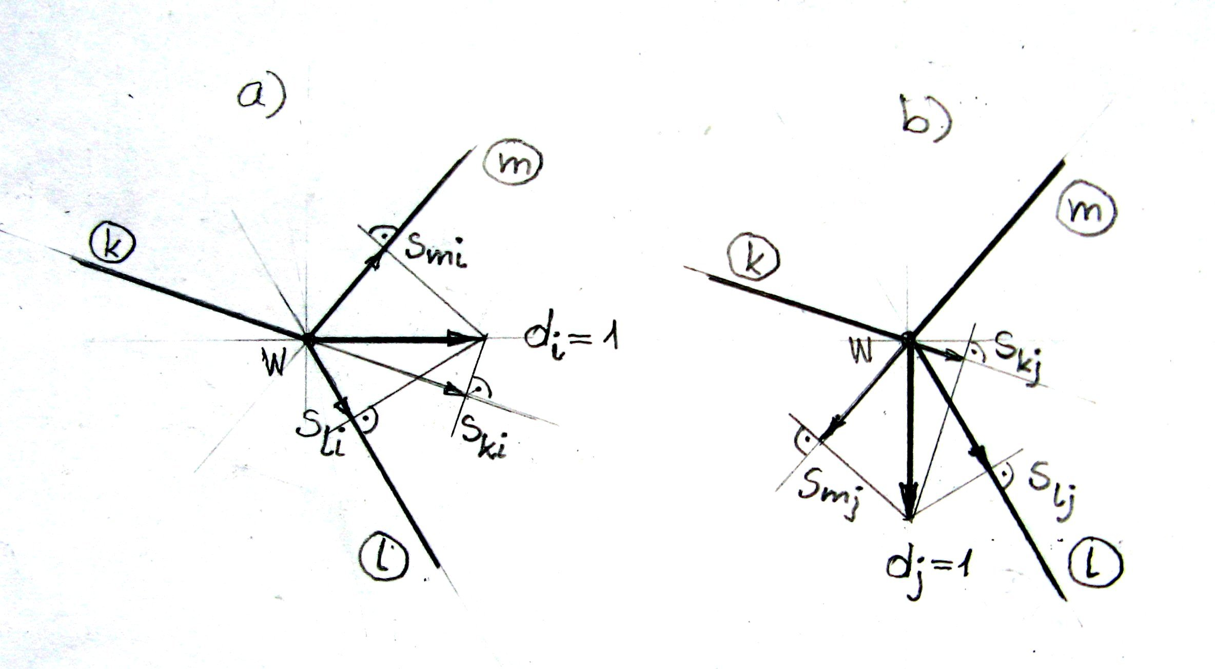 Analiza ruchliwości łańcucha kinematycznego